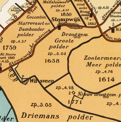 Drooggemaakte Grote Polder